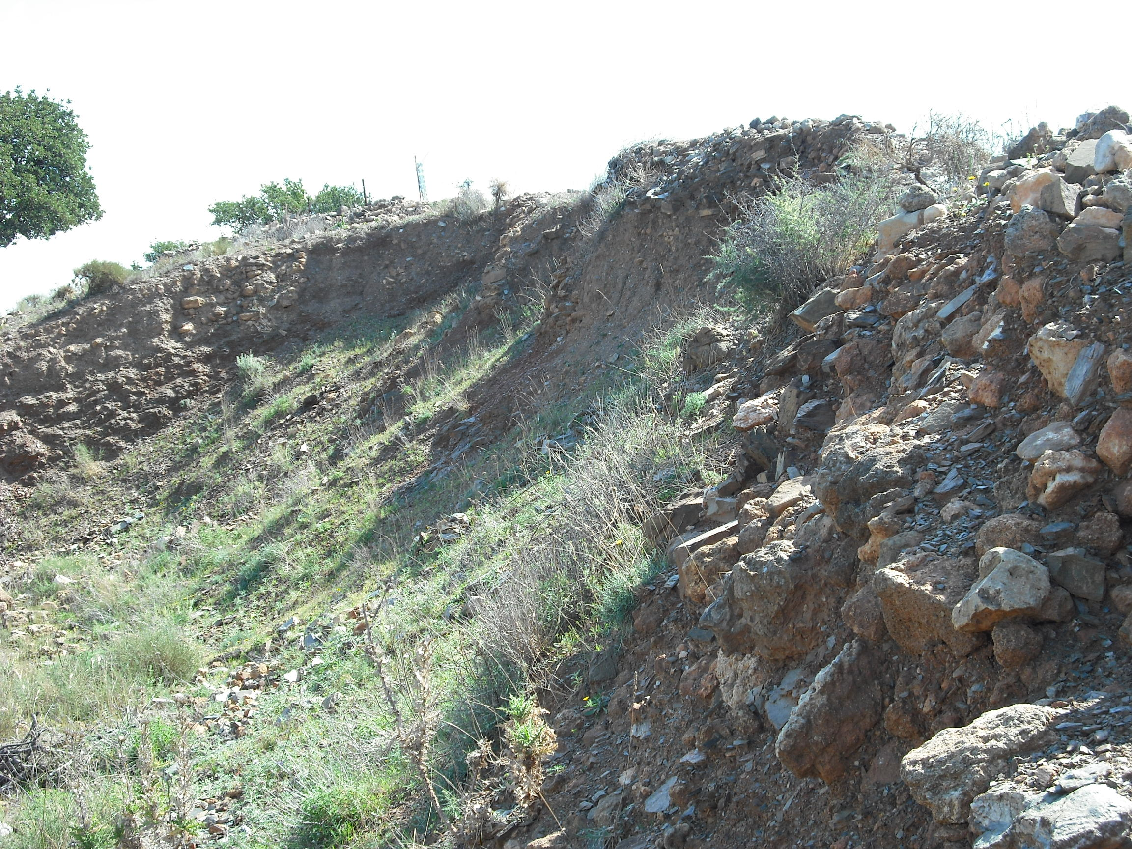 Toscanos, Cerro del Peñón, Cerro Alarcón, Cerro del Mar y Necrópolis de Jardín